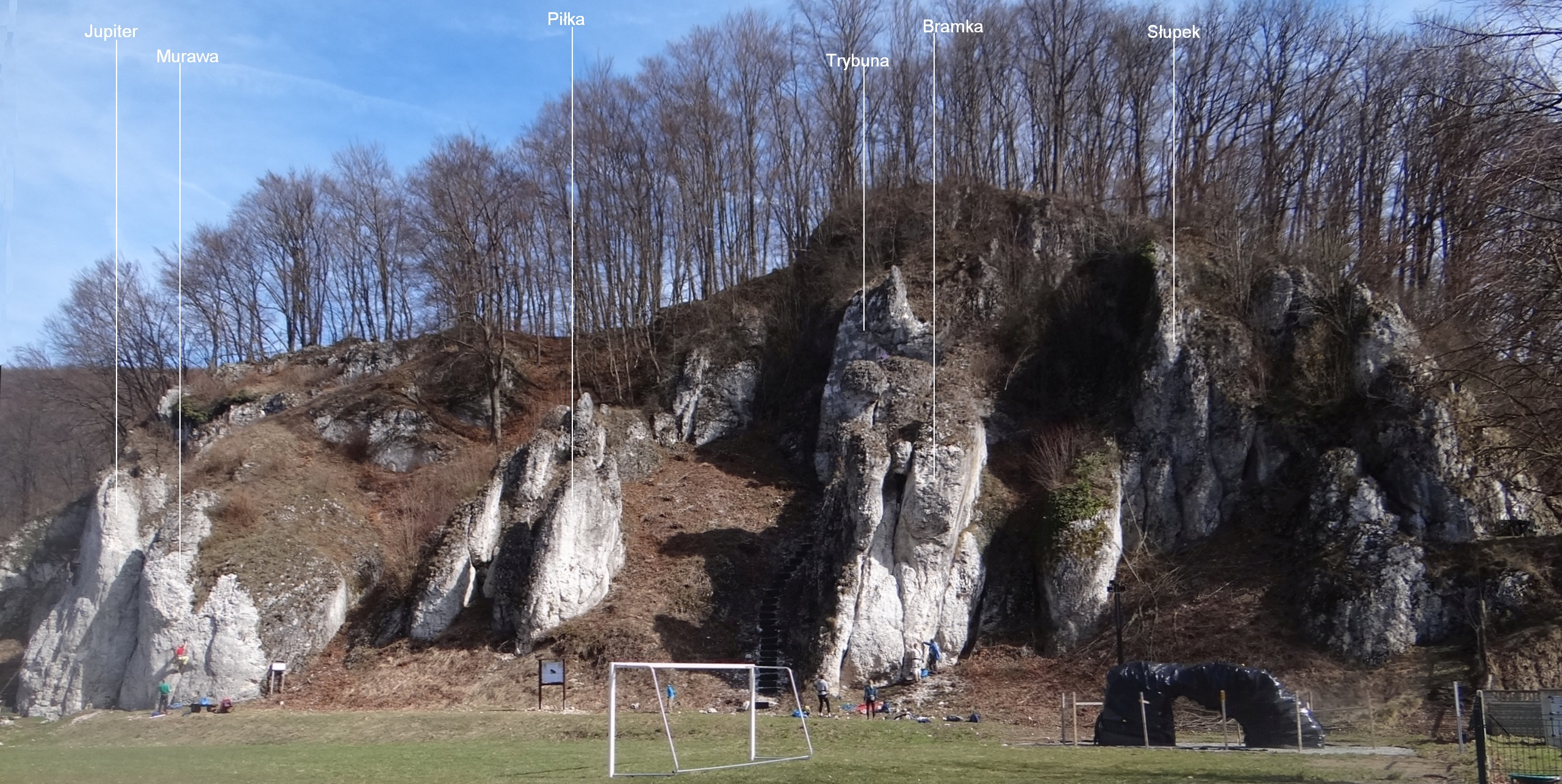 Skała Jupiter w grupie skał nad Boiskiem w Dubiu